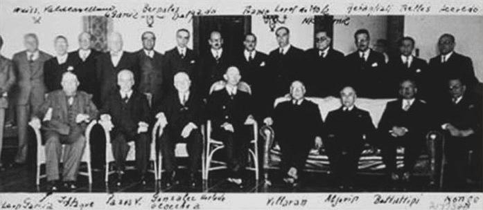 H. Lambert (Rockefeller Foundation, EE.UU.) en compañía del conjunto de la plana de autoridades y catedráticos de la Facultad de Medicina de San Fernando de la UNMSM (Lima, Perú; enero de 1926).